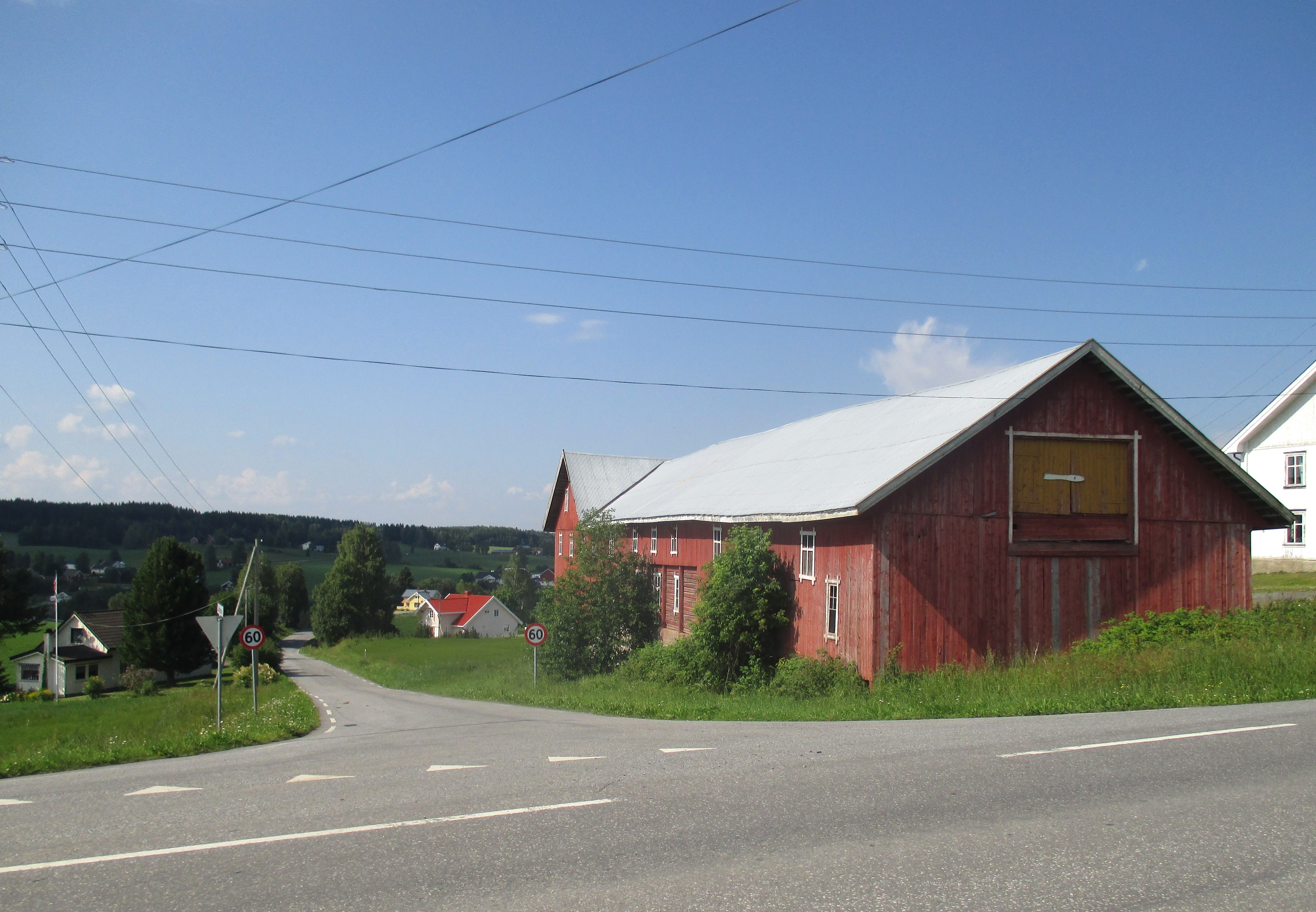 Sørøstenden av fylkesvei 2347 (tidl. FV81)